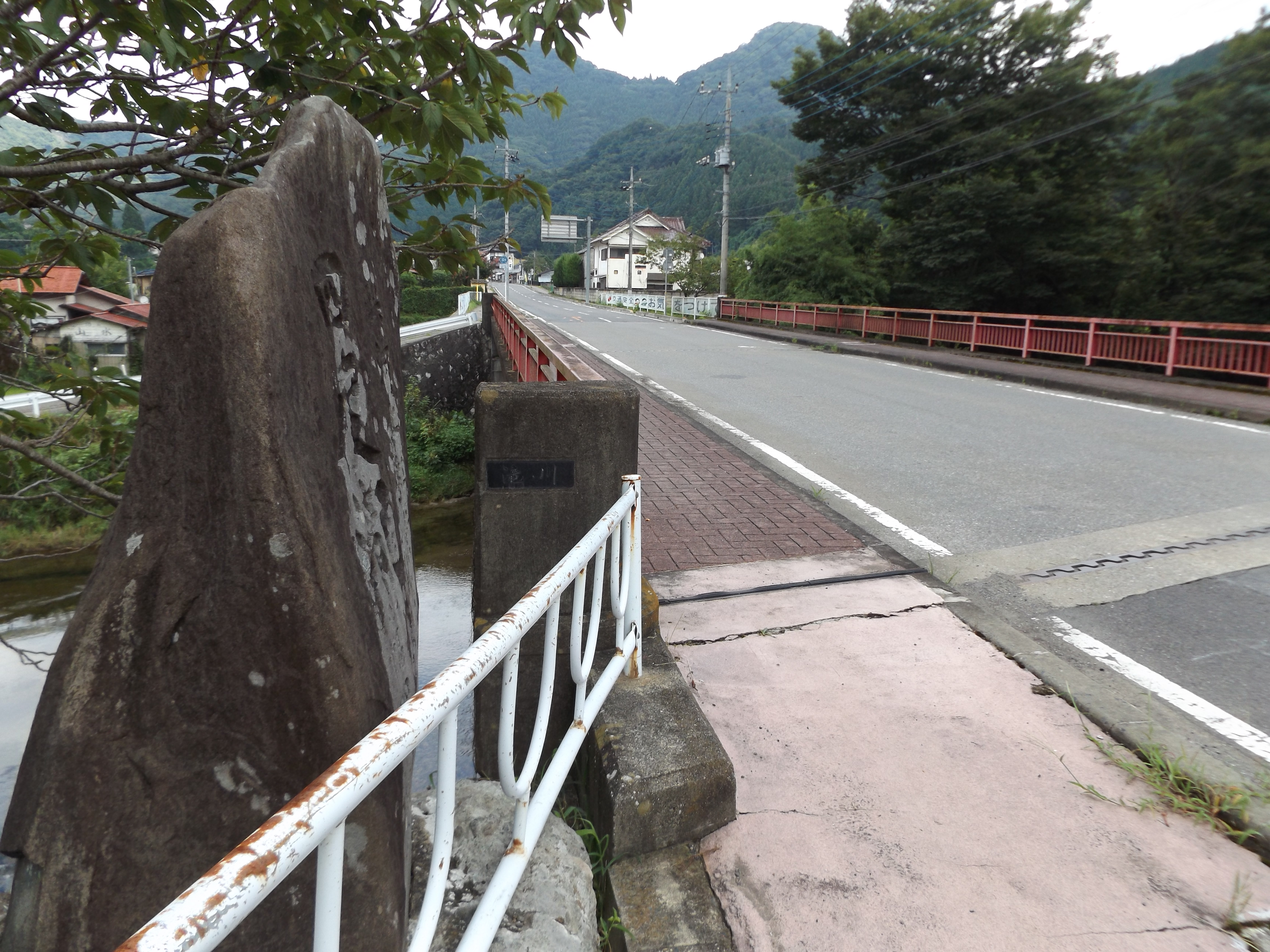 茨城県久慈郡大子町袋田にある茨城県道324号袋田停車場四度ノ滝線の四度の橋。 滝川に架かっている。